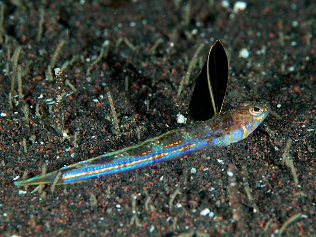 ウサギトラギス Osopsaron formosensis